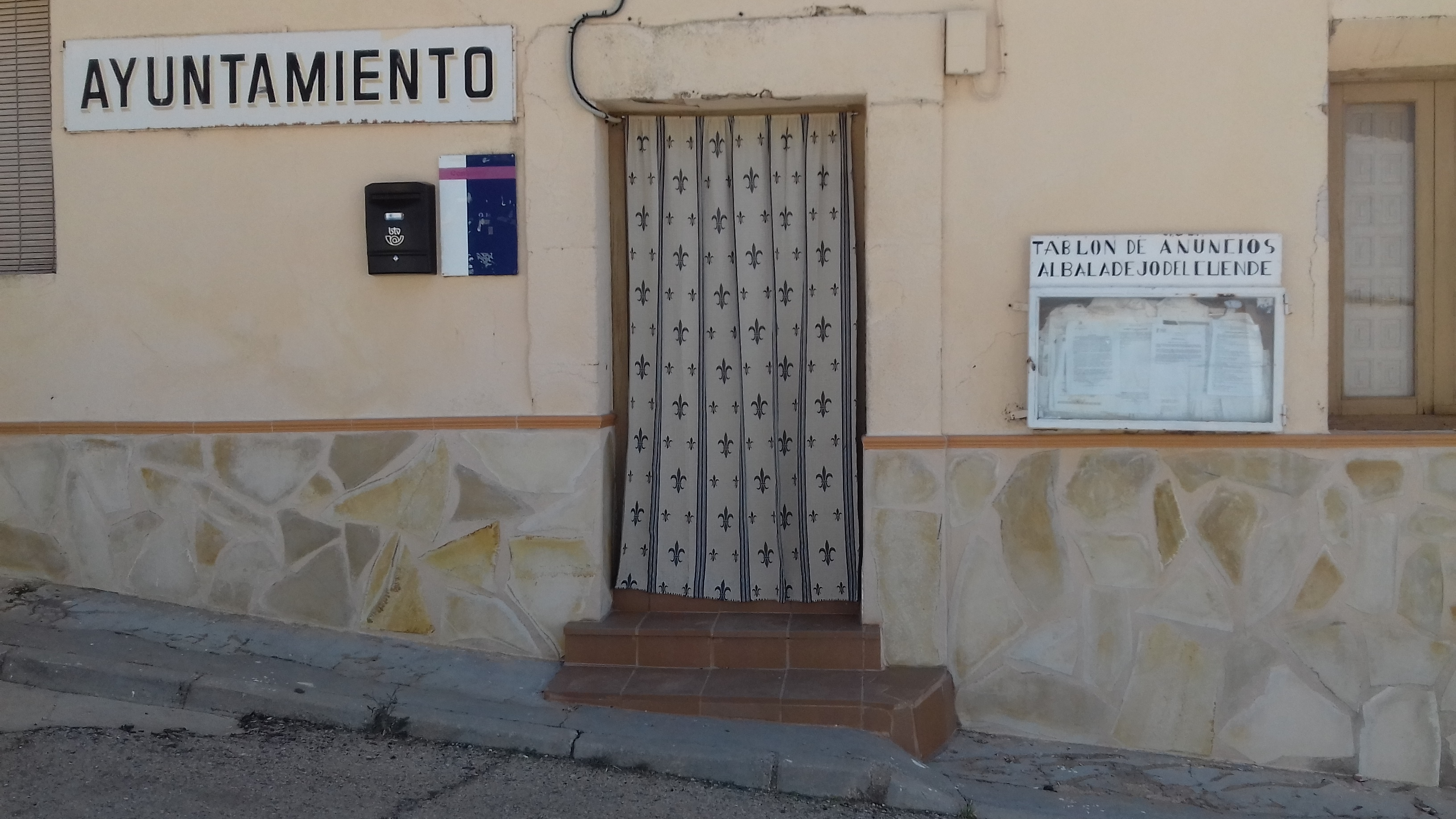 Casa consistorial de Albaladejo del Cuende